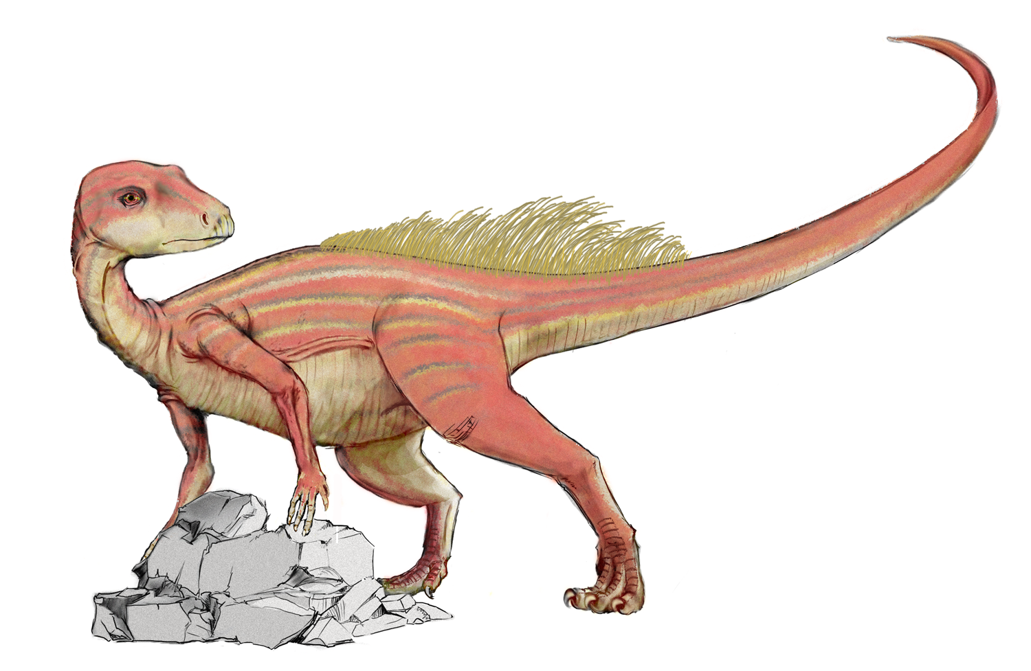 Abrictosaurus, a sort of dinosaur